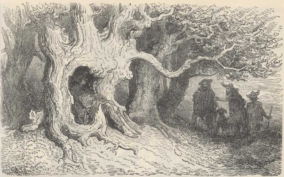 Os pastores encontram o ladrão